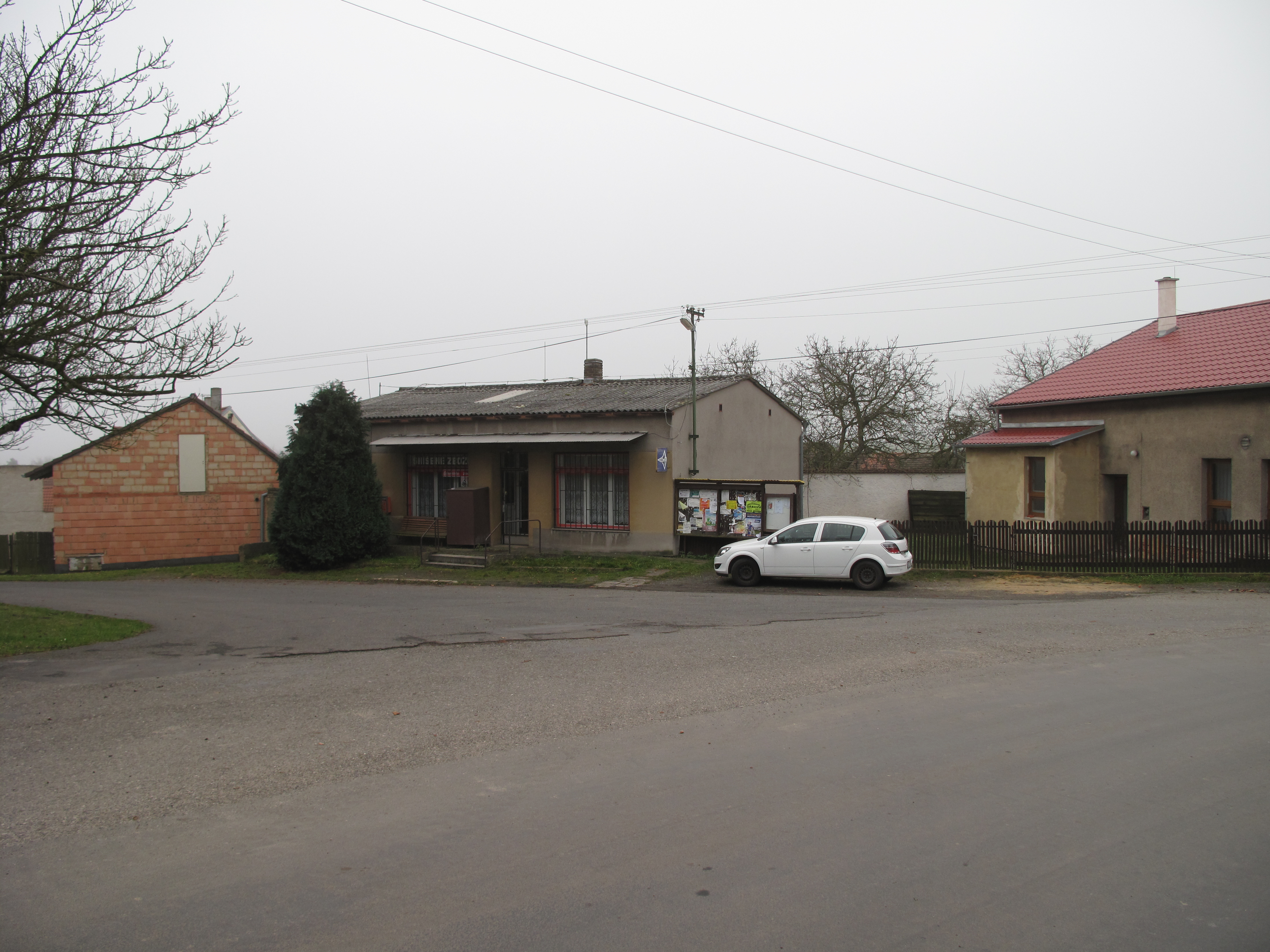 Náves ve Hvozdu. Okres Rakovník, Česká republika.